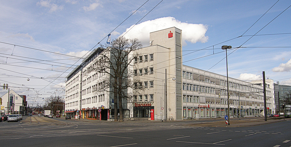 Früheres Geha Werksgebäude in Hannover